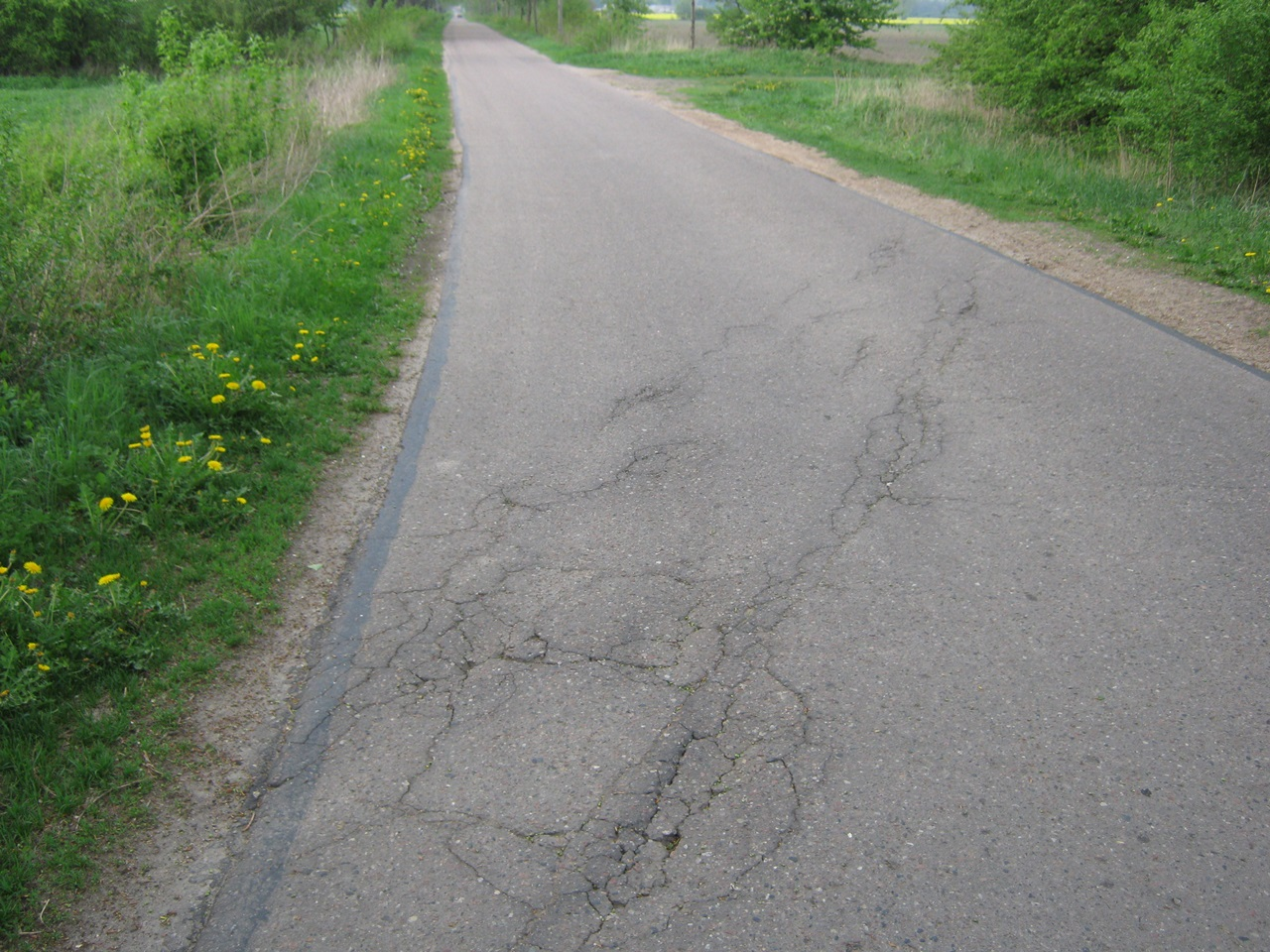 Resztki przejazdu kolejowego w Malczewie (droga Malczewo- Mikołajewice- Niechanowo)